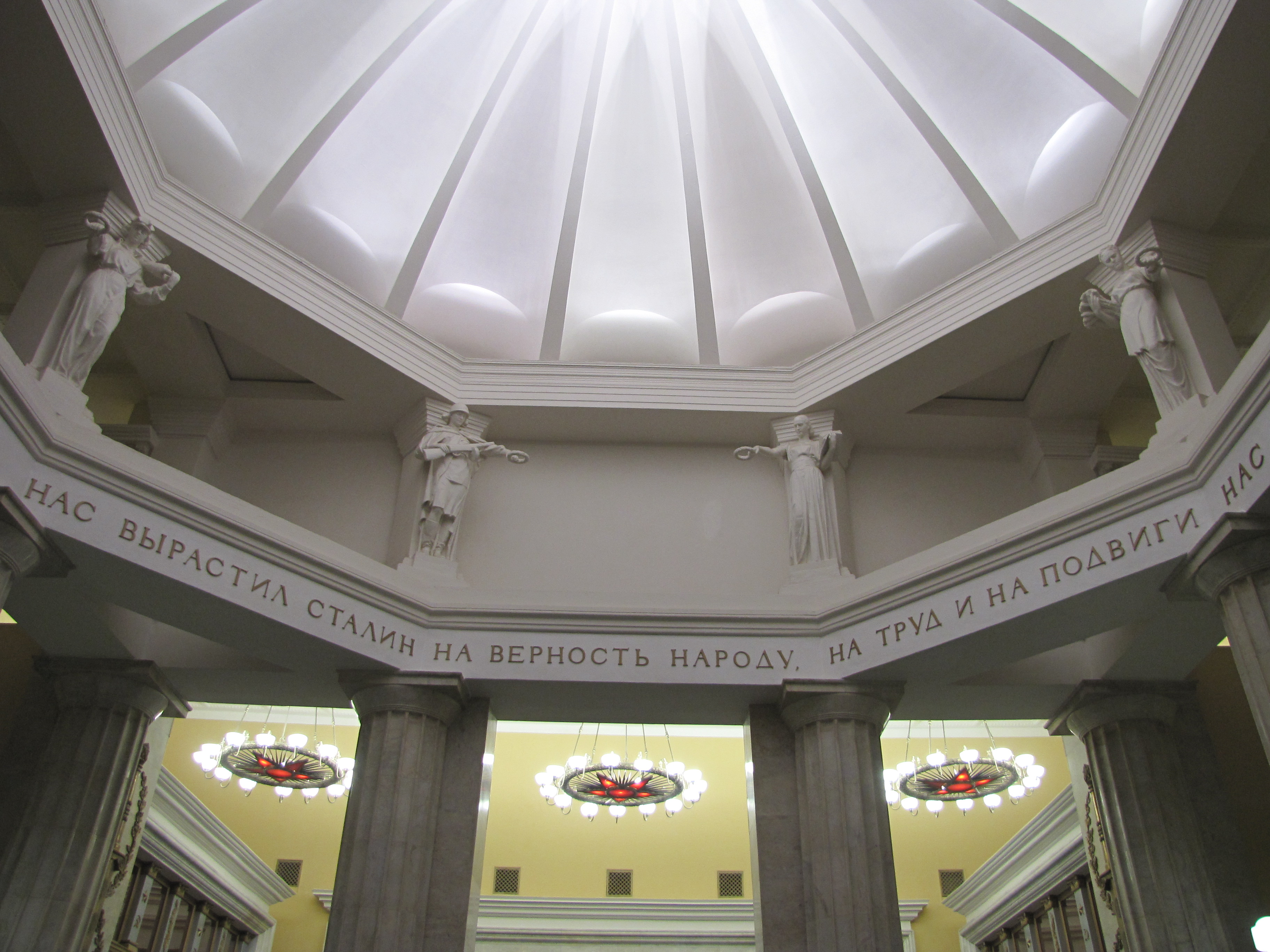 по ошибке была после ремонта установленна вместо строки о Ленине